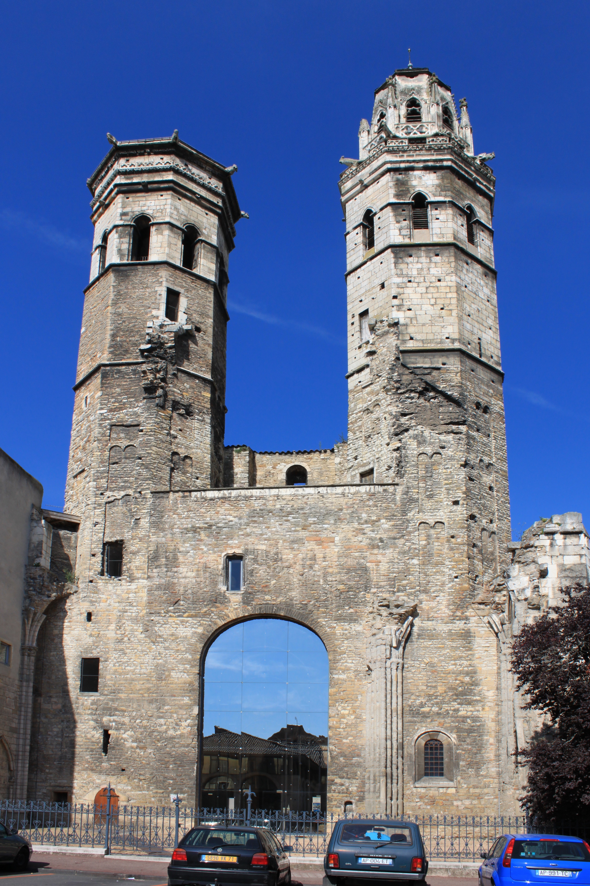 Cathédrale Vieux Saint-Vincent de Mâcon, Mâcon, Saône-et-Loire, Bourgogne, France